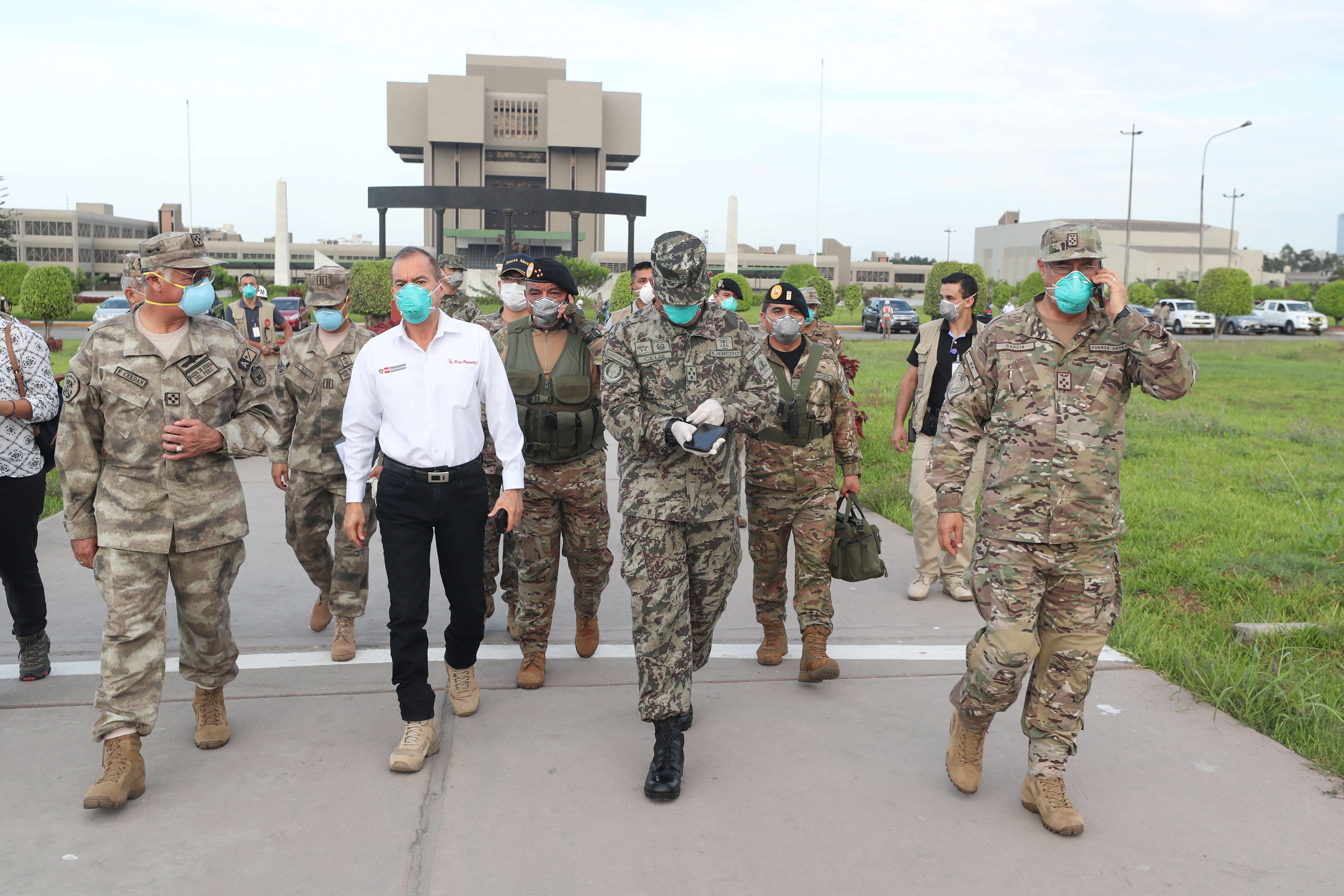 MINISTRO DE DEFENSA SOBREVOLÓ POR SEGUNDO DÍA CONSECUTIVO DISTINTOS PUNTOS DE LIMA PARA VERIFICAR CUMPLIMIENTO DE AISLAMIENTO OBLIGATORIO ESTABLECIDO POR EL ESTADO DE EMERGENCIA